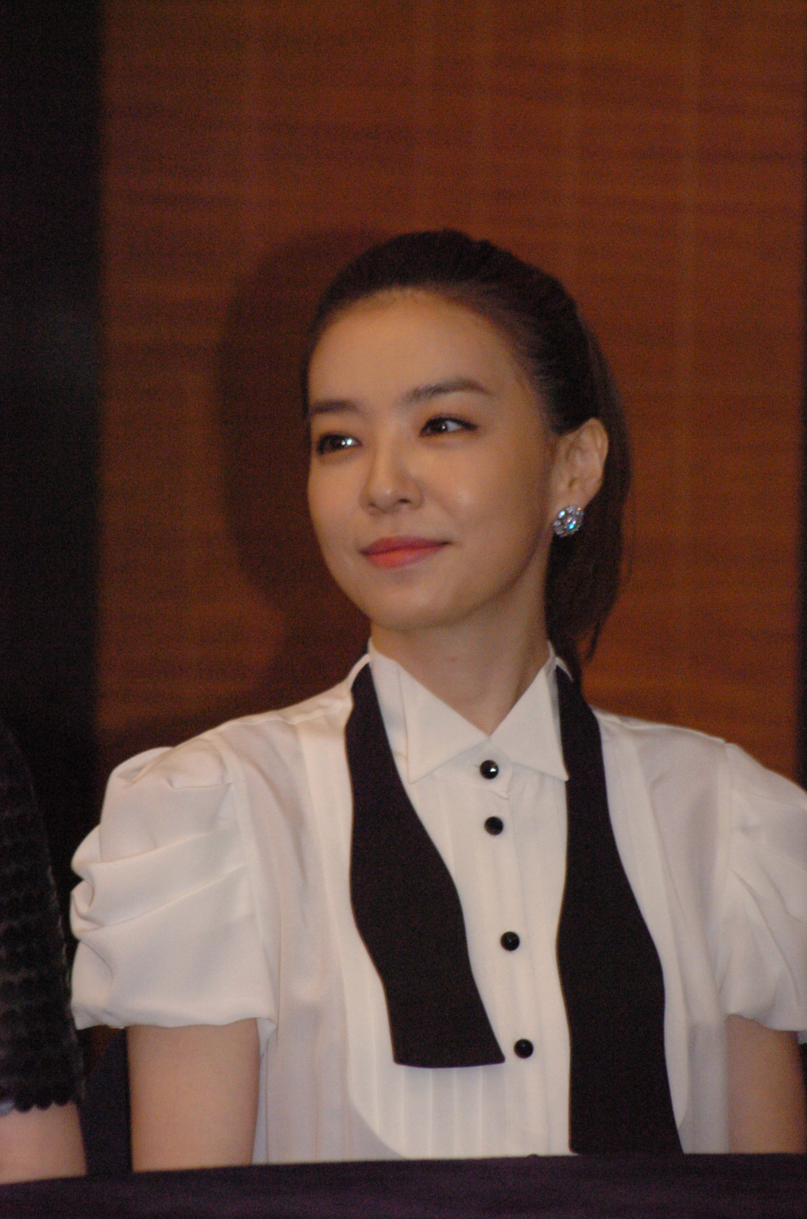 그대없인못살아 014